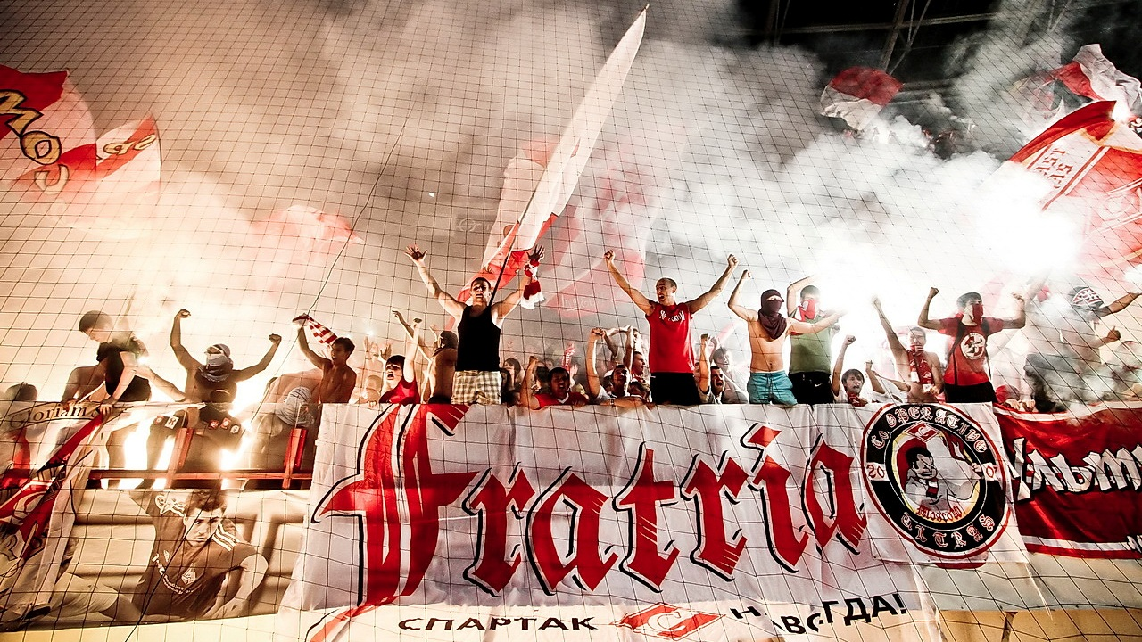 Пиротехническое шоу на матче с "Локомотивом" в Черкизово. 2010 год